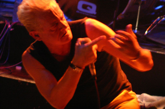 "Graham Bonnet"